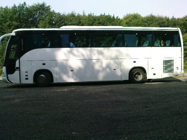 Eurorider впрофіль